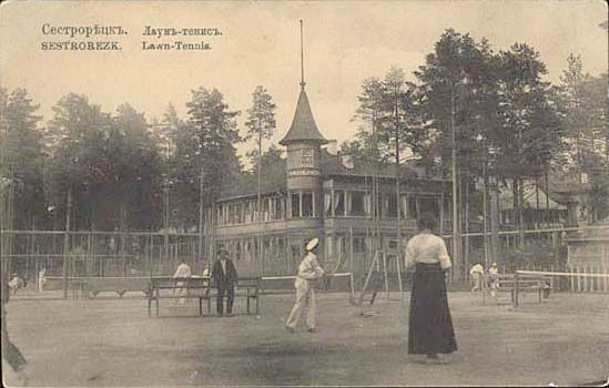 Лаун тенис в Сестрорецком курорте